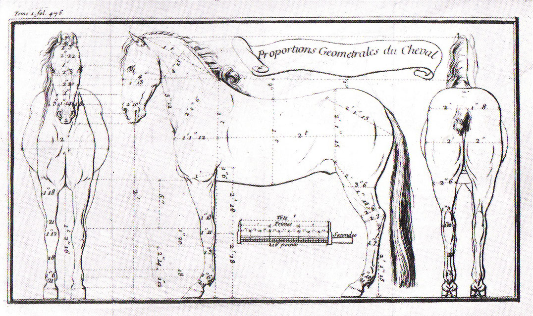 Proportions Géométrales du Cheval, planche extraite du tome premier des Elémens d’hippiatrique de Claude Bourgelat (1712–1779)